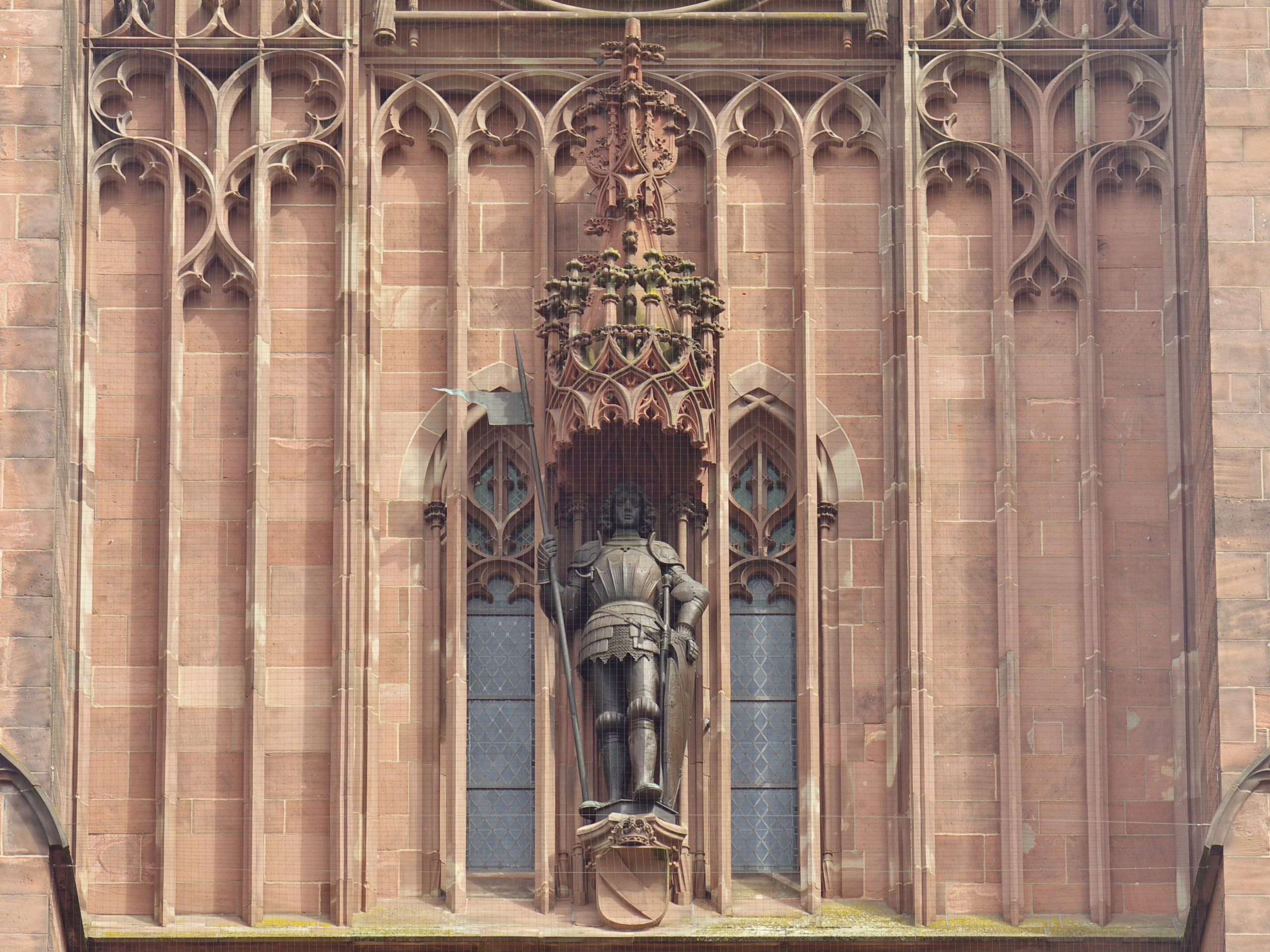 Neugotischer Fassadenschmuck an der Kirche St. Bernhard in Karlsruhe mit Standbild Bernhards II. von Baden von Fridolin Dietsche